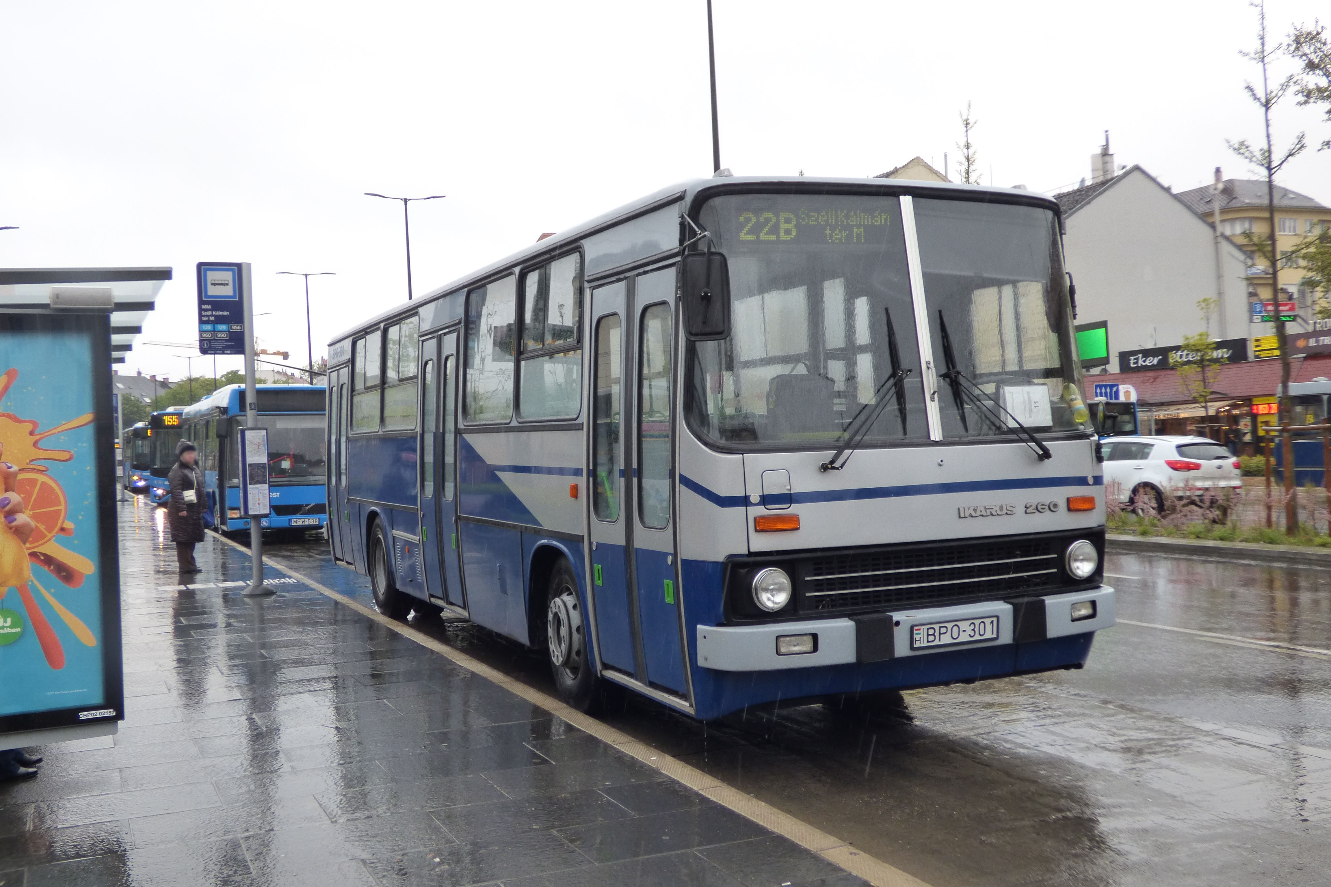 22B jelzésű ideiglenes járat (Ikarus 260) a Széll Kálmán téri végállomásán (frsz. BPO-301)